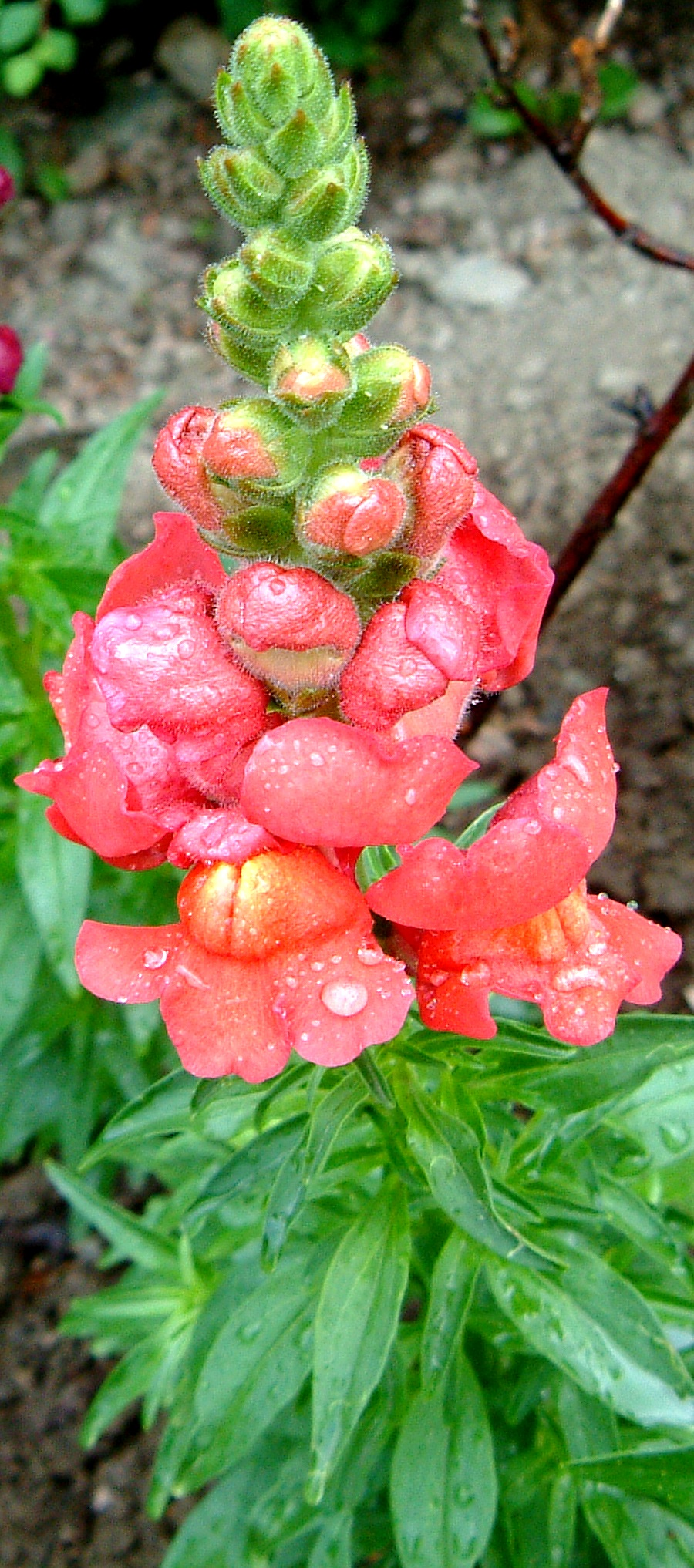 Antirrhinum_-_snapdragon_-_Löwenmaul